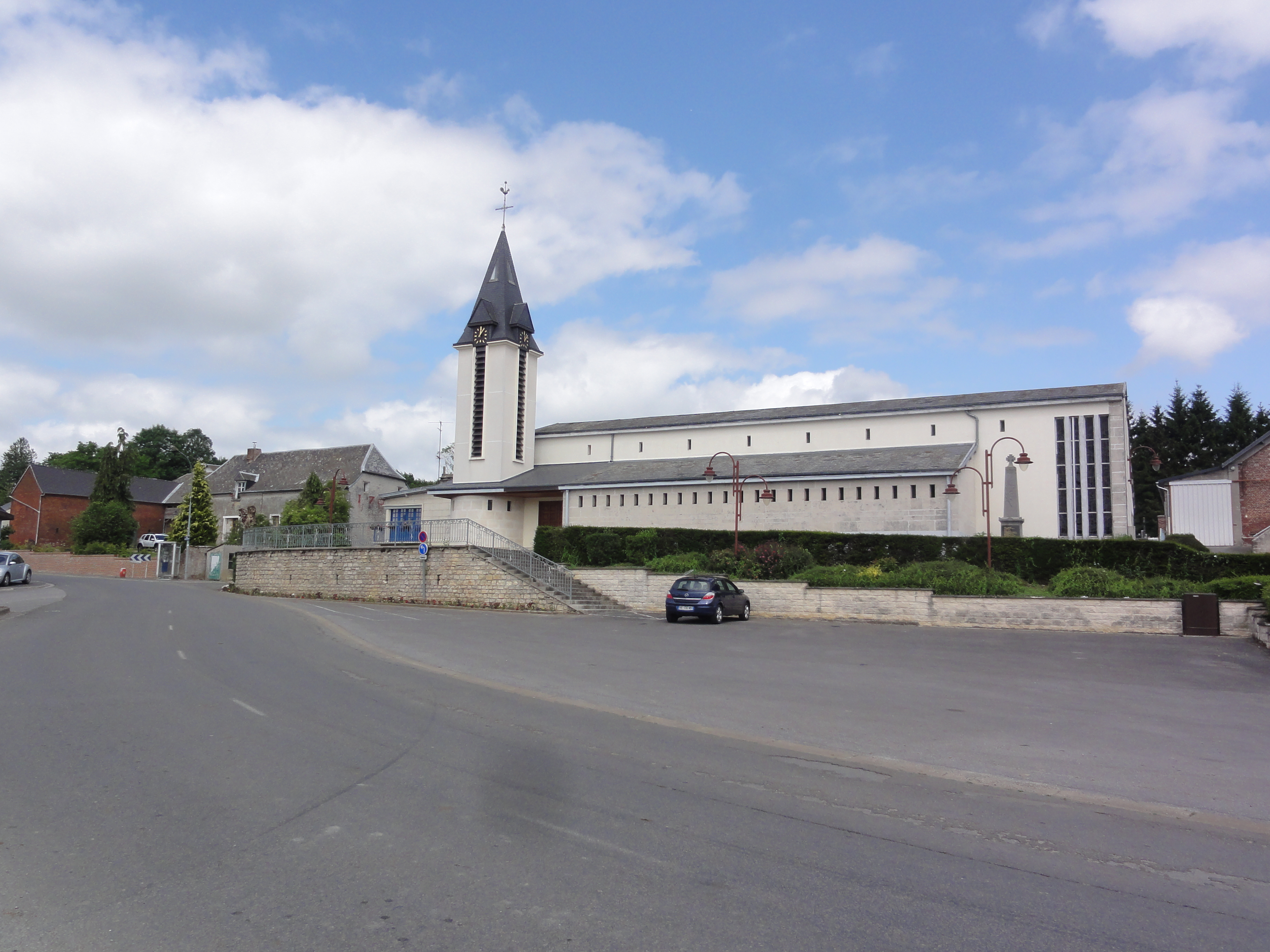 Luzoir (Aisne) place de l'église